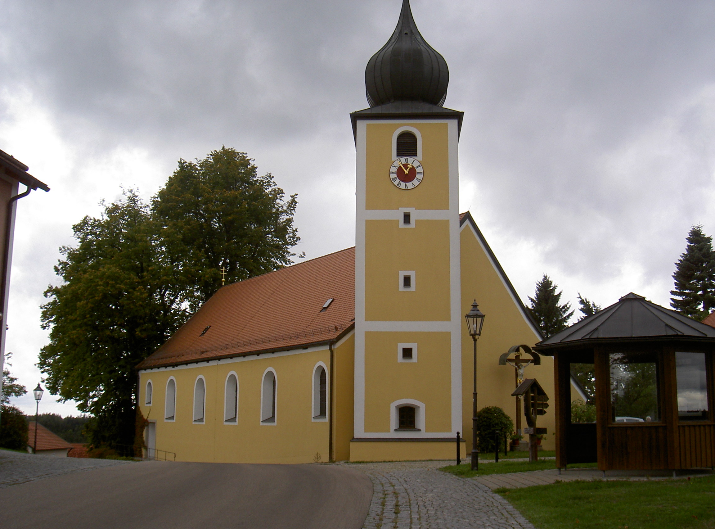 St. Christoph (Neukirchen zu Sankt Christoph)